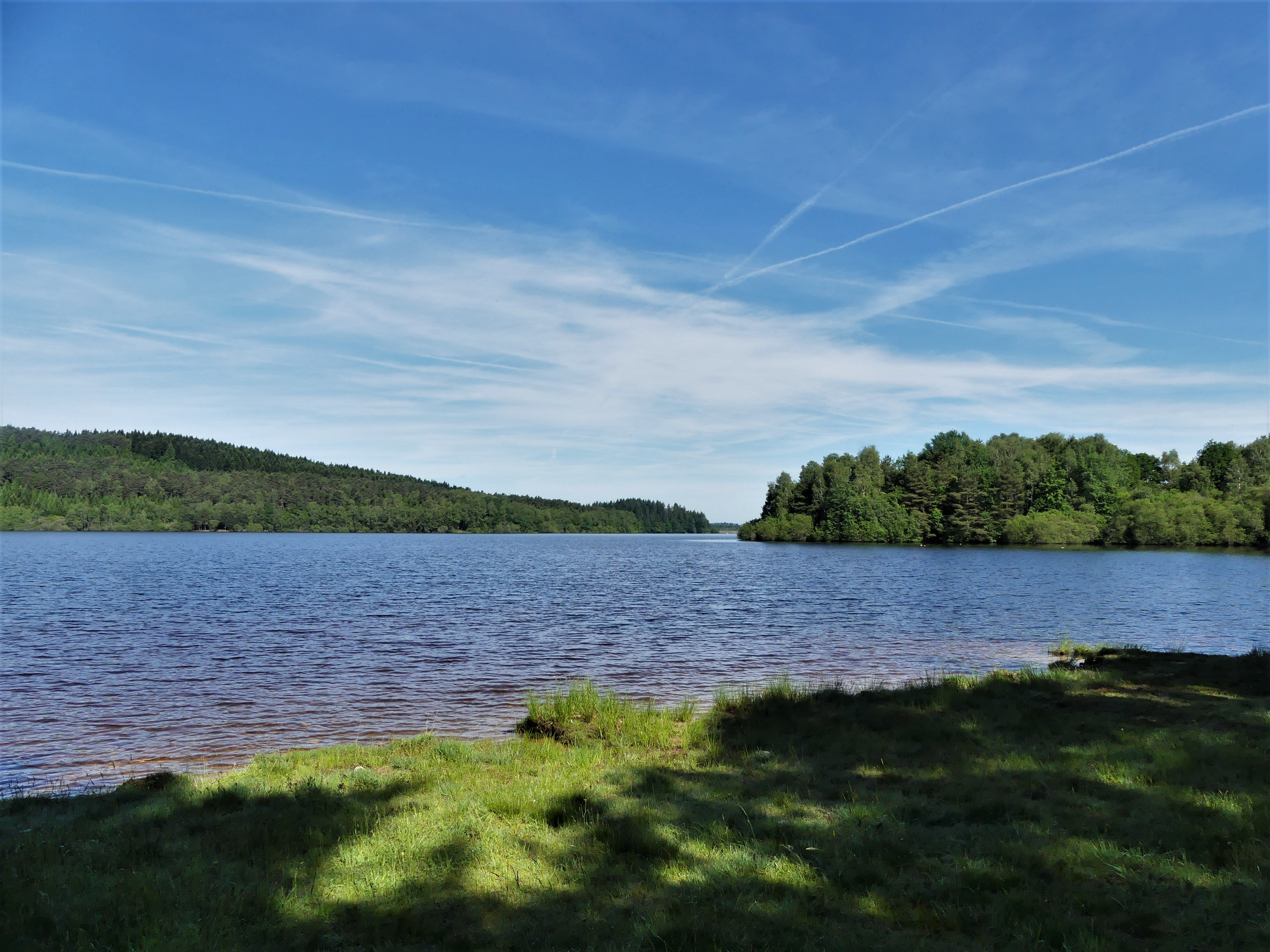 Le lac de la Vaud Gelade à l'aire des Pondauds, Saint-Marc-à-Loubaud, Creuse, France.